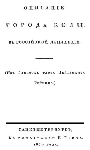 Титульный лист «Описание города Колы в Российской Лапландии»